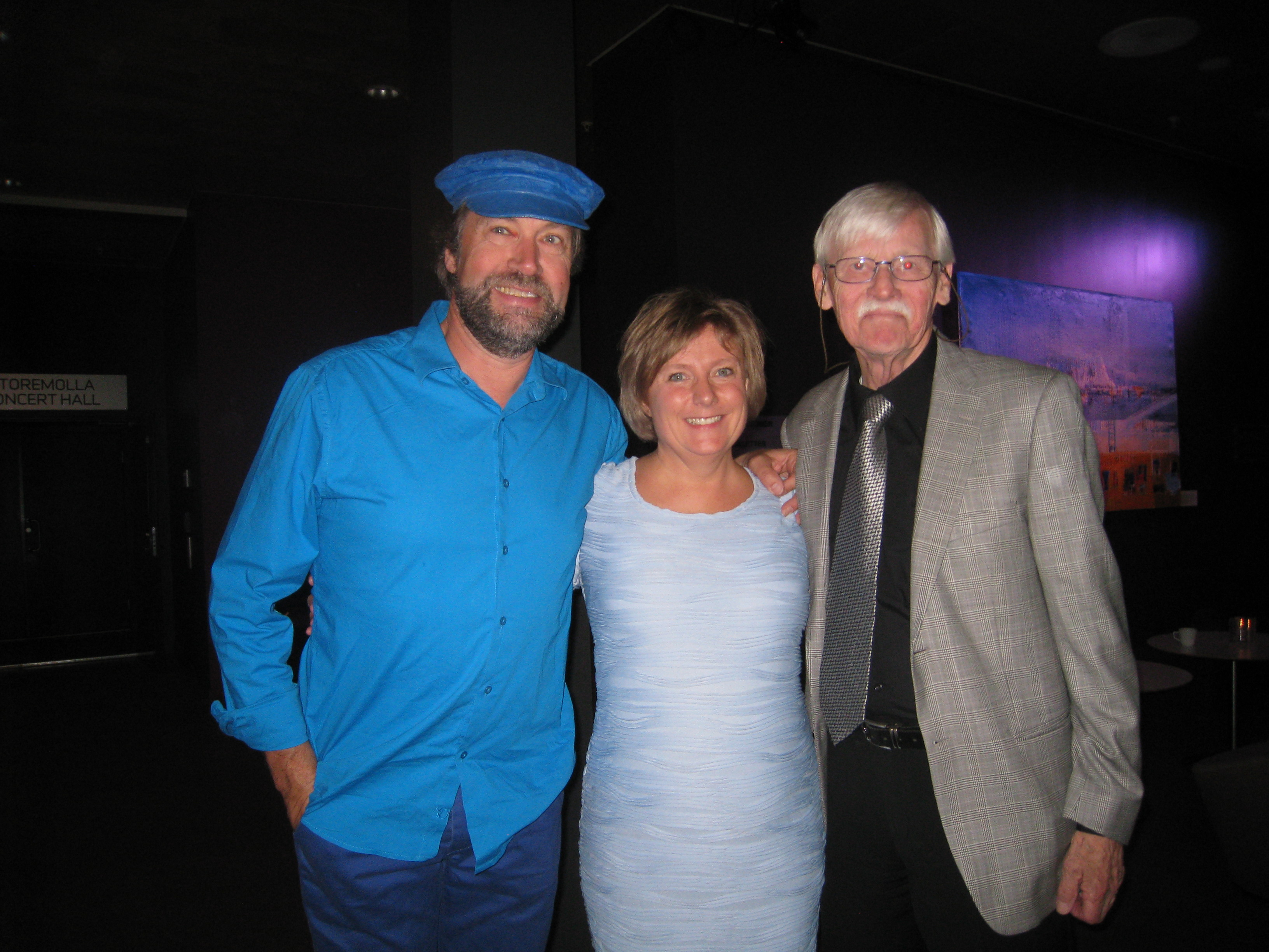 Musikeren Ola Bremnes (f 1955), forfatter Linda Lillevik (f 1964) og tegner Dagfinn Bakke (f 1933) ved lanseringen av bok og cd "Fly med", en gjenfortelling av sagnet om skarvene fra Utrøst. September 2014